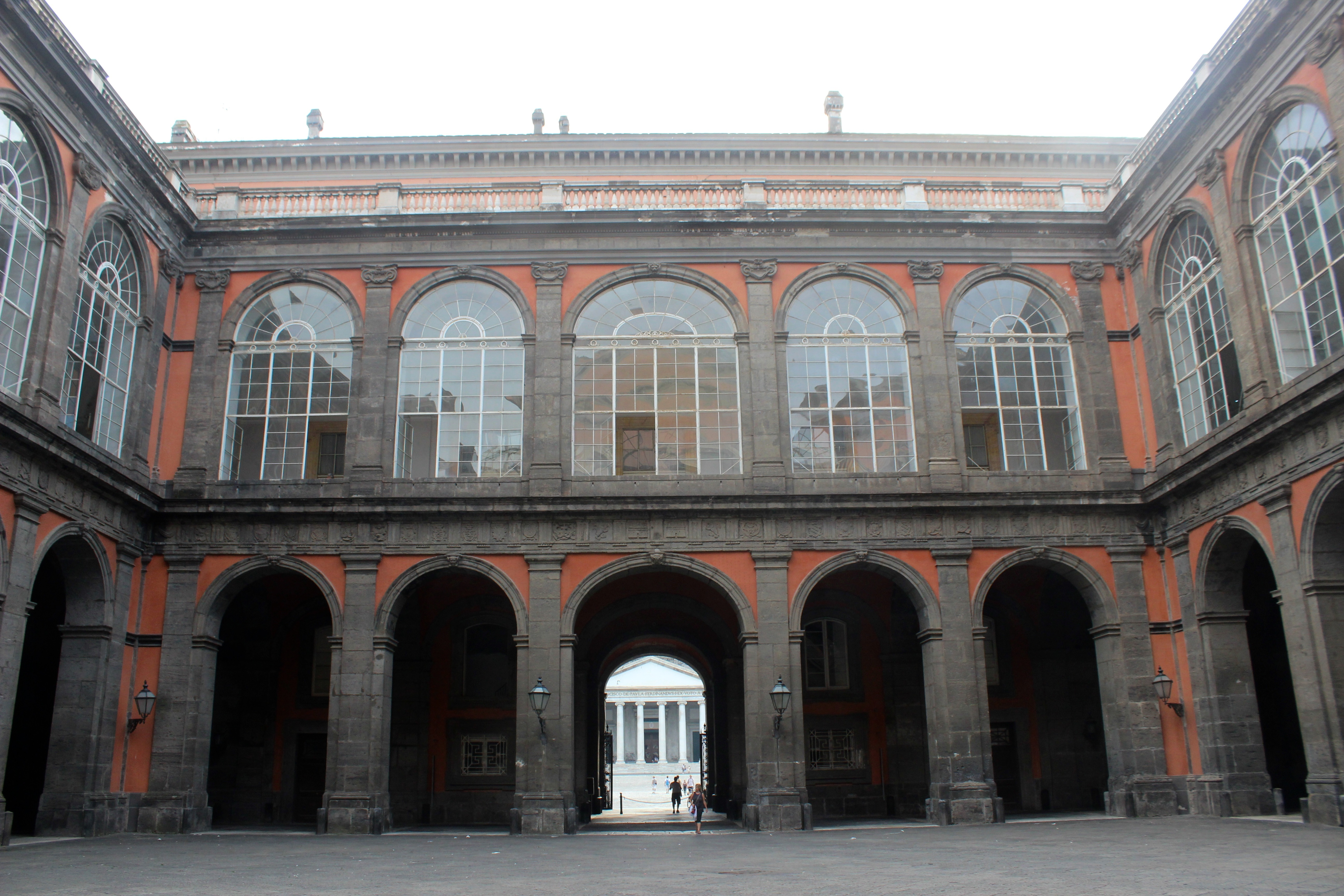 Nápoles. Palacio Real. Patio.